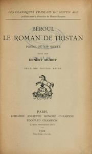 Le roman de Tristan